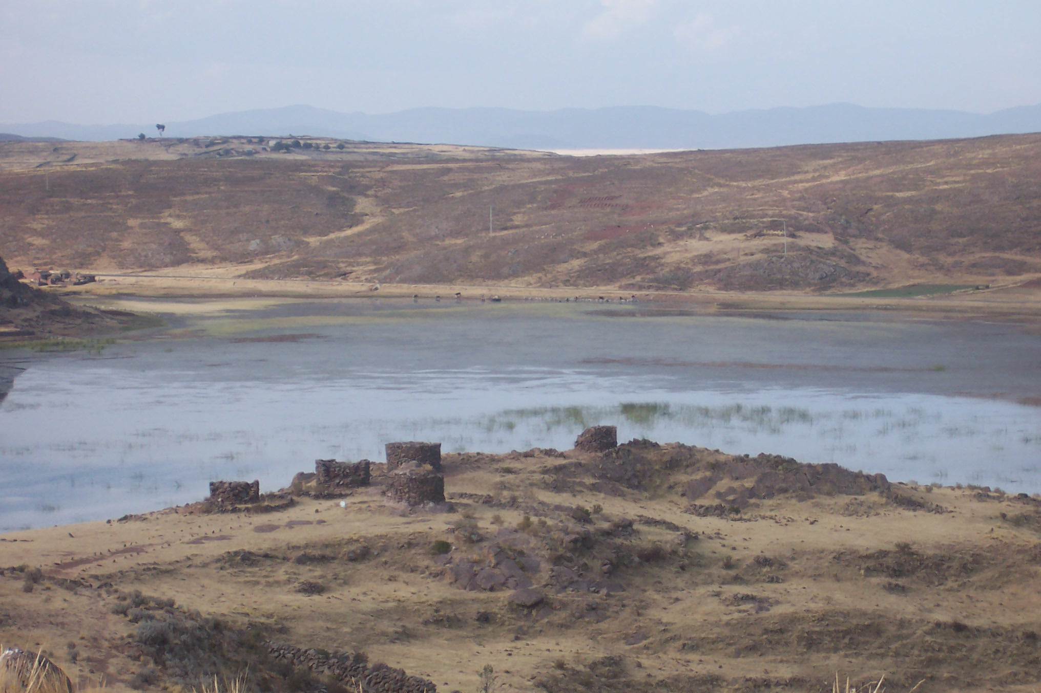 Lago Umayo — y Chulpa en la región de Sillustani, Departamento de Puno. Monumento mortuorio de la época Kolla. Credits Autor: Alfredobi Fecha: Agosto 2006